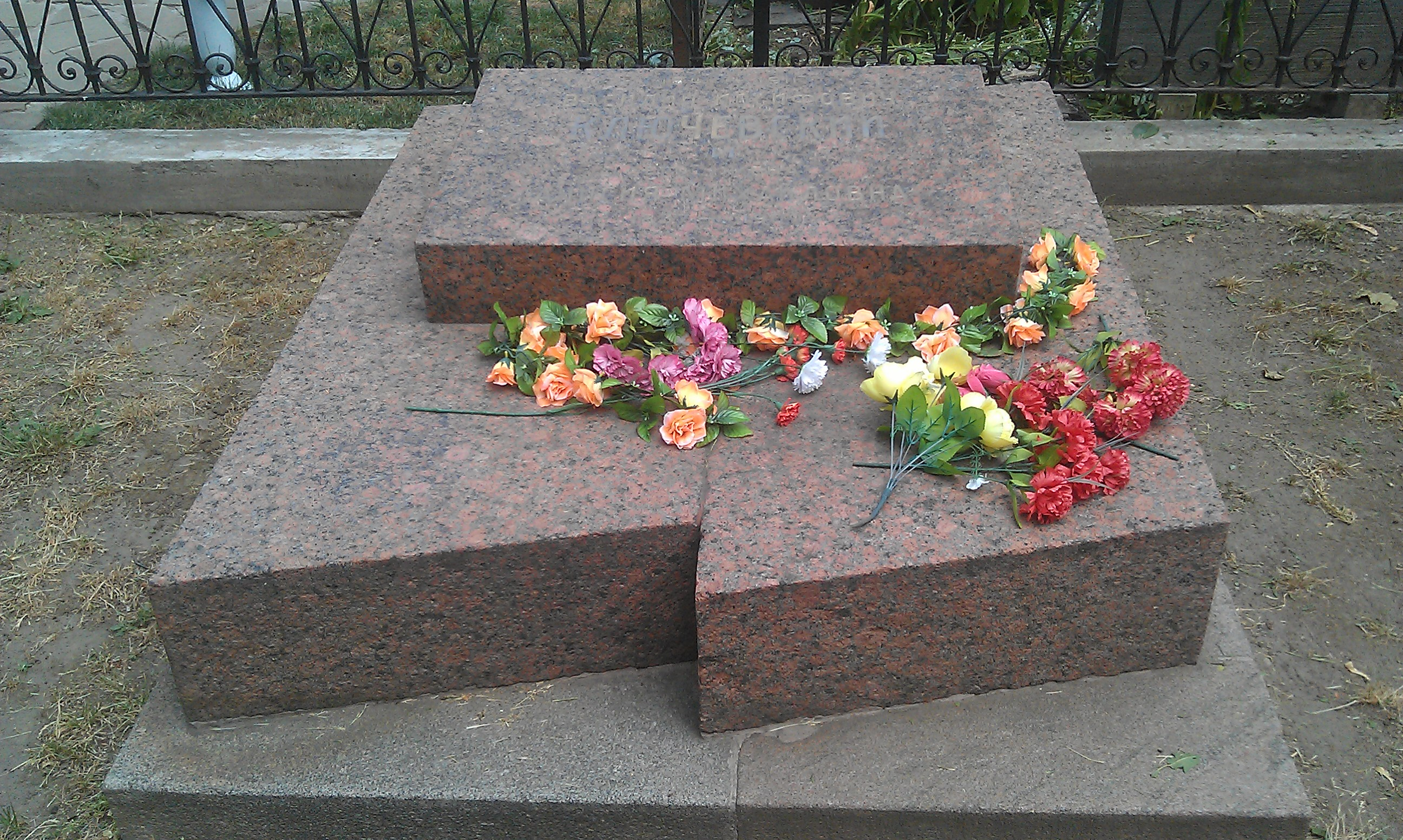 могила В. О. Ключевского на кладбище Донского монастыря